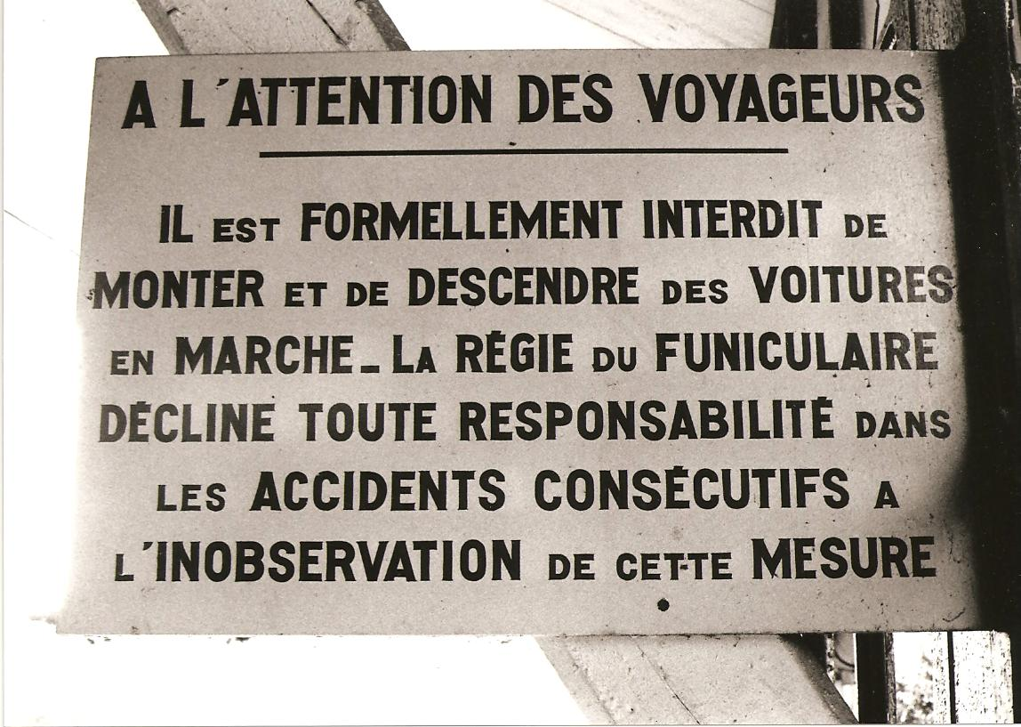 Ancienne pancarte dans la gare basse, en 1990